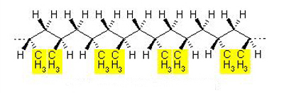 polypropylen syndiotaktisch